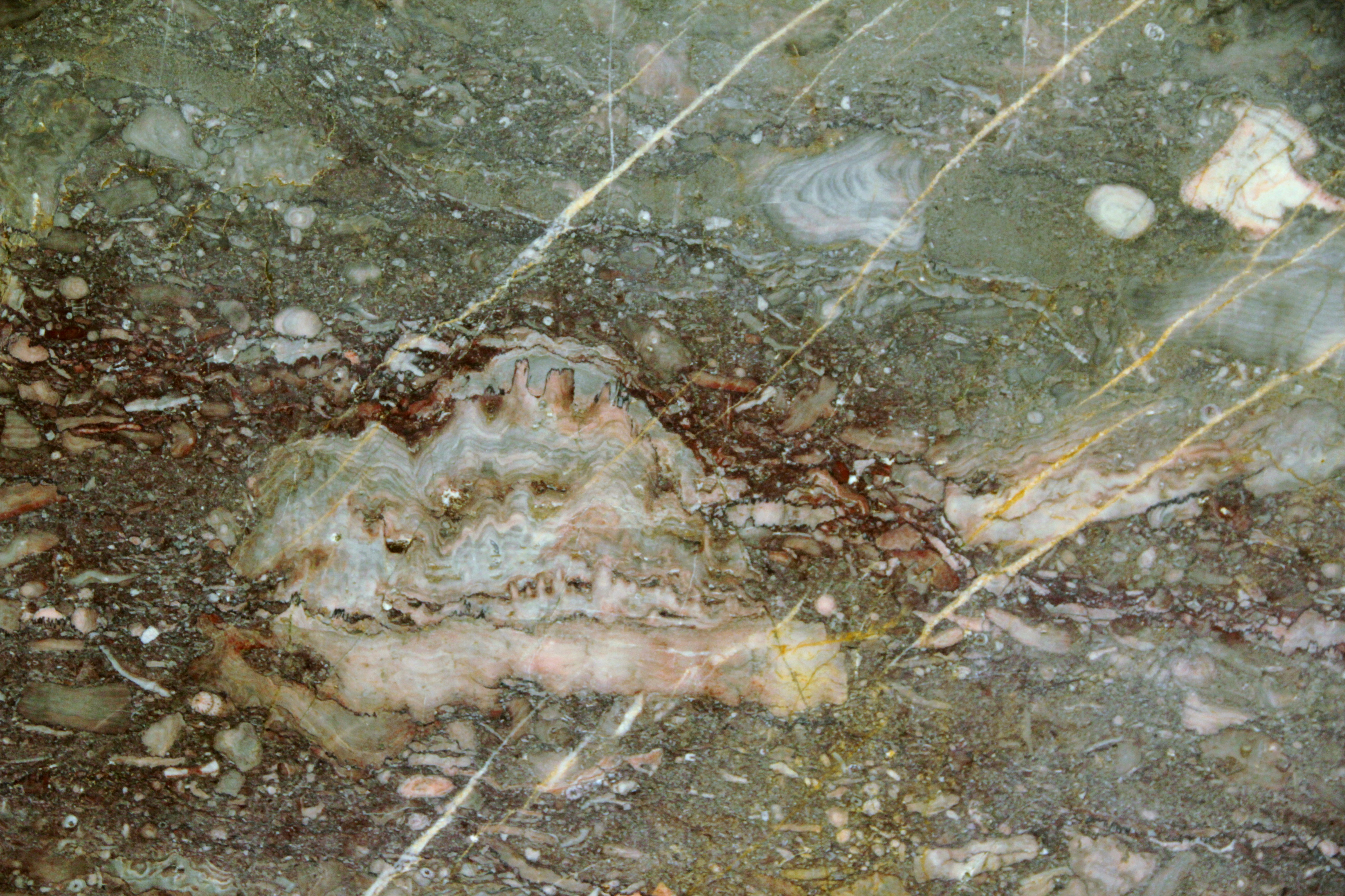 Vorwiegend roter Lahnmarmor findet sich im Steinbruch Unica, Villmar. In diesem Stromatoporen-Riff finden sich fossile Reste koloniebildender Meerestiere.